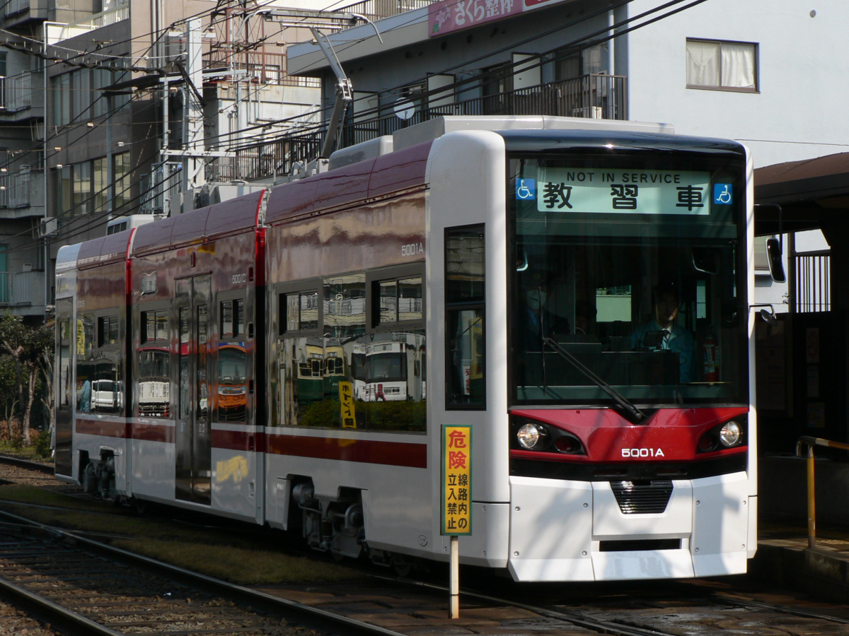 長崎電気軌道5001号